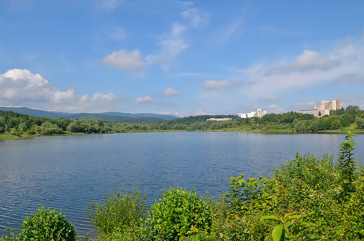 Вид на панораму гор с трускавецкого водохранилища